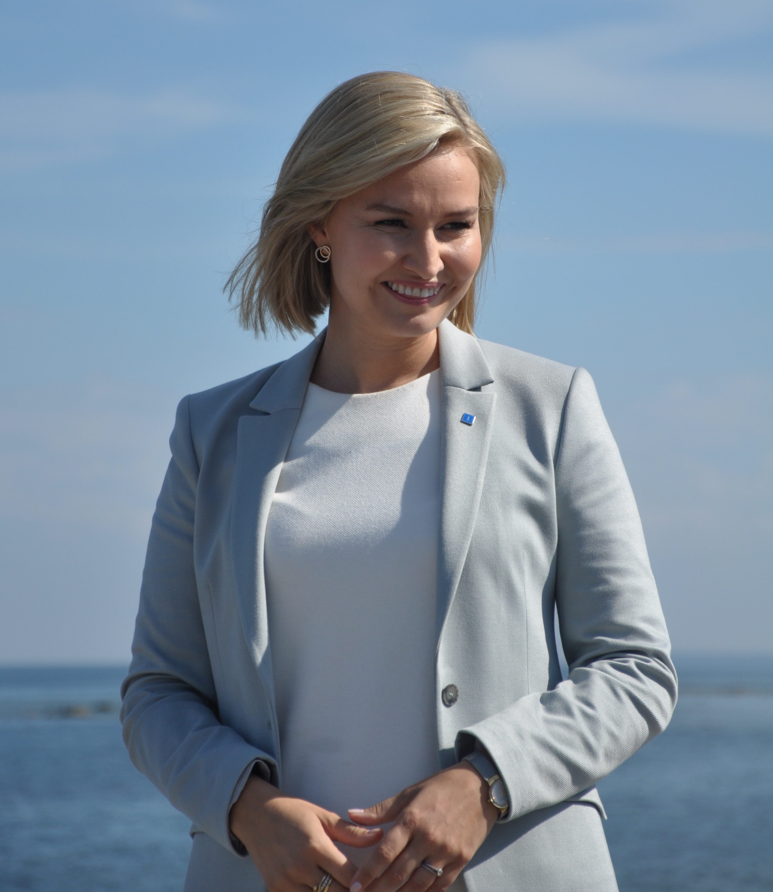 Eba Bush Thor i Almedalen 2018